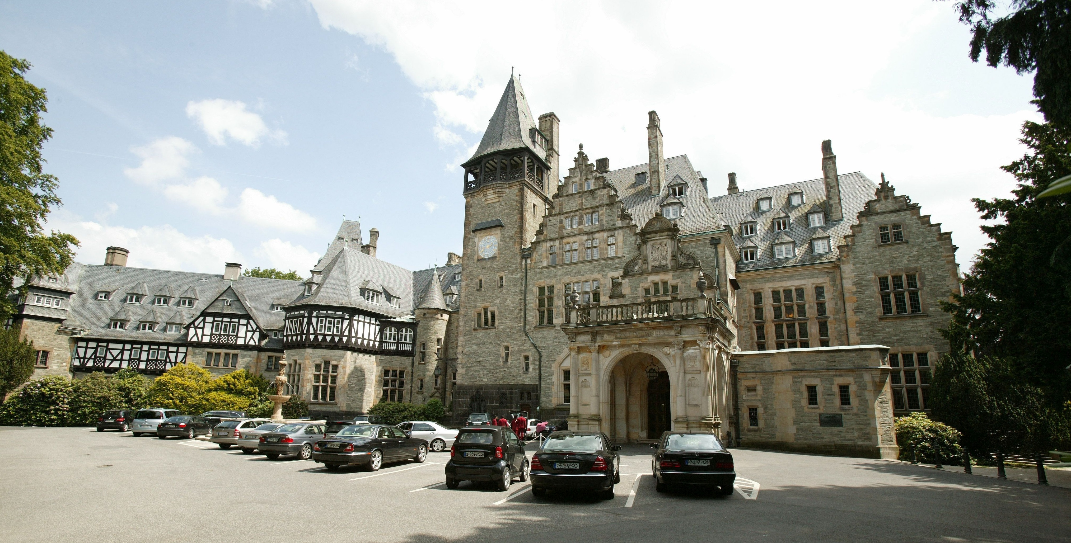 Schlosshotel Kronberg, Empfangshof mit weiter Flügelspreizung